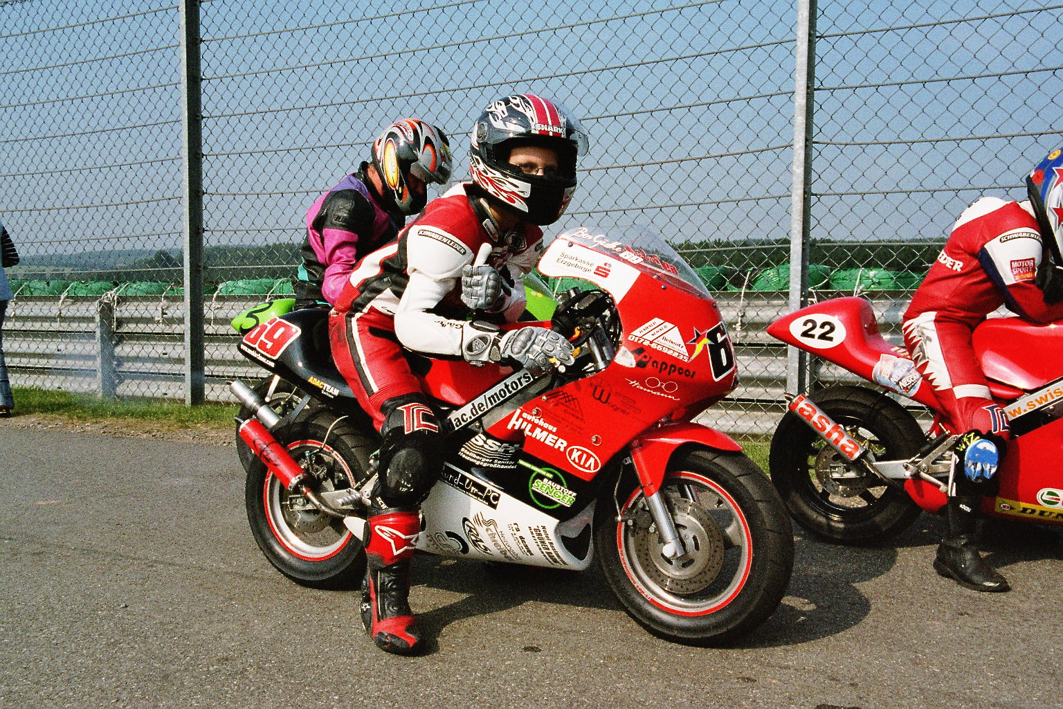 Ben Gädke fuhr 2005 mit dieser KTM in der bundesweit offenen Sächsischen Mini-Bike-Meisterschaft.